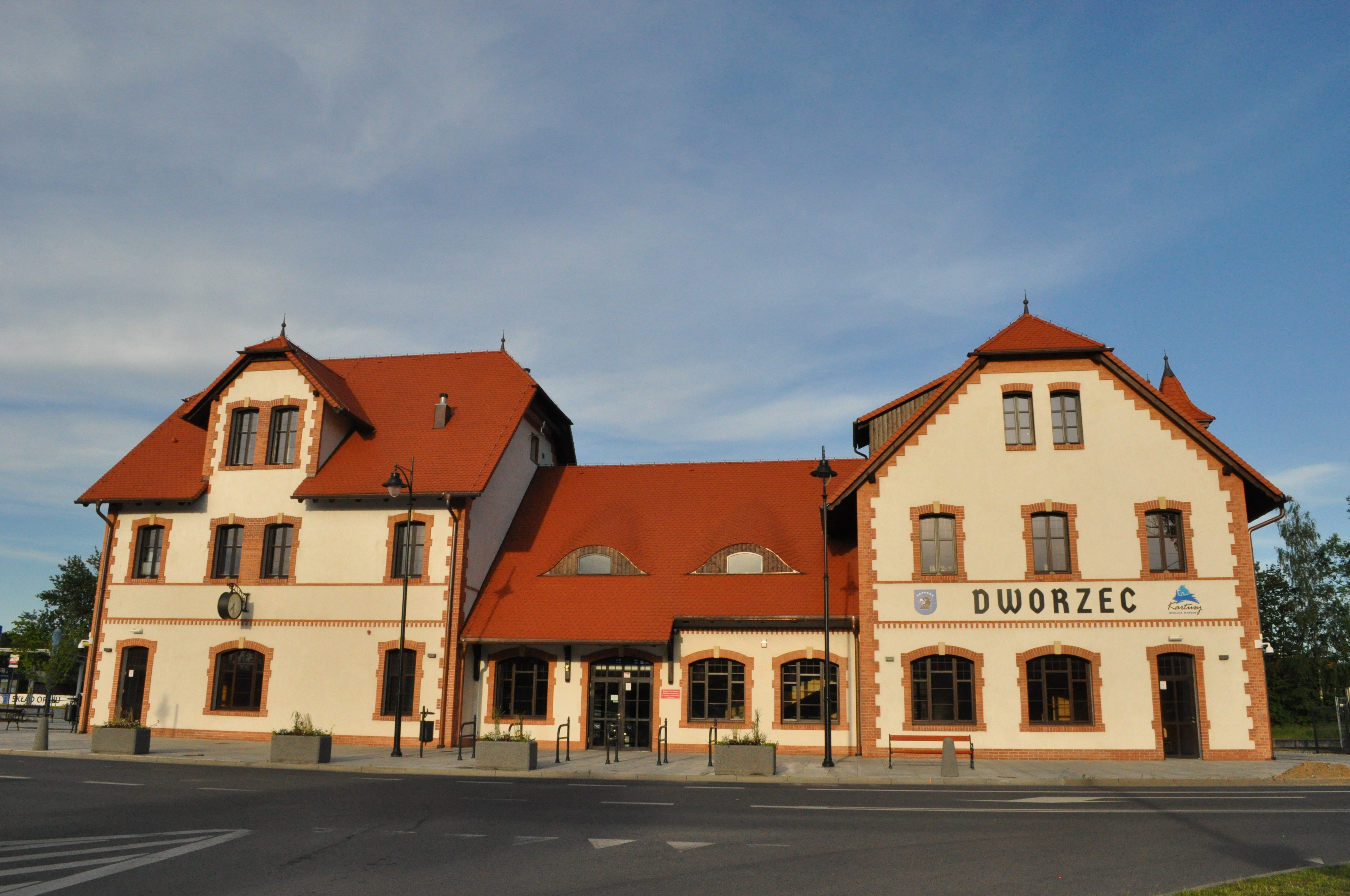 Dwrzec w Kartuzach po renowacji